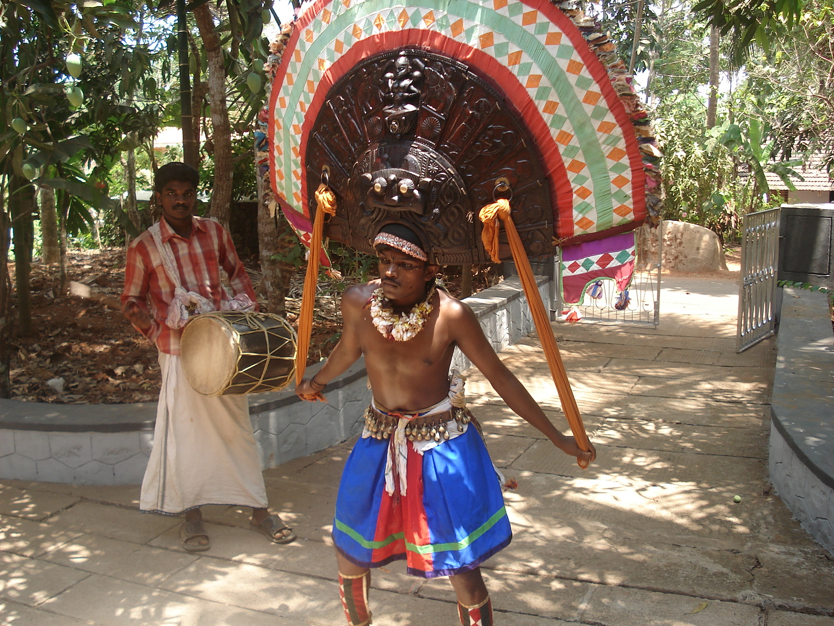 “Thara”, Chirankara Pooram, Pallippuram